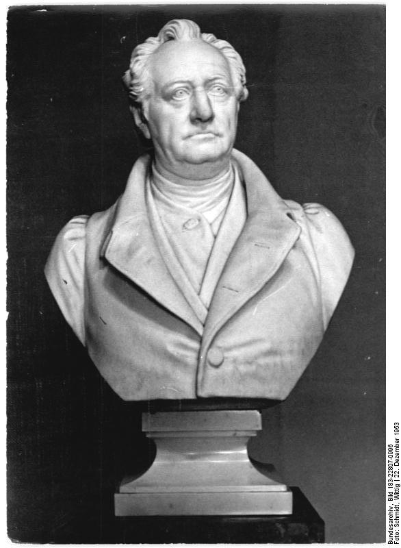 Weimar, Fürstengruft, Goethe-Büste Zentralbild TBD-Schmidt-Wittig 22.12.1953 Goethe Büste in der Fürstengruft in Weimar.